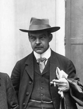 Hansi, caricaturiste alsacien : photographie de presse